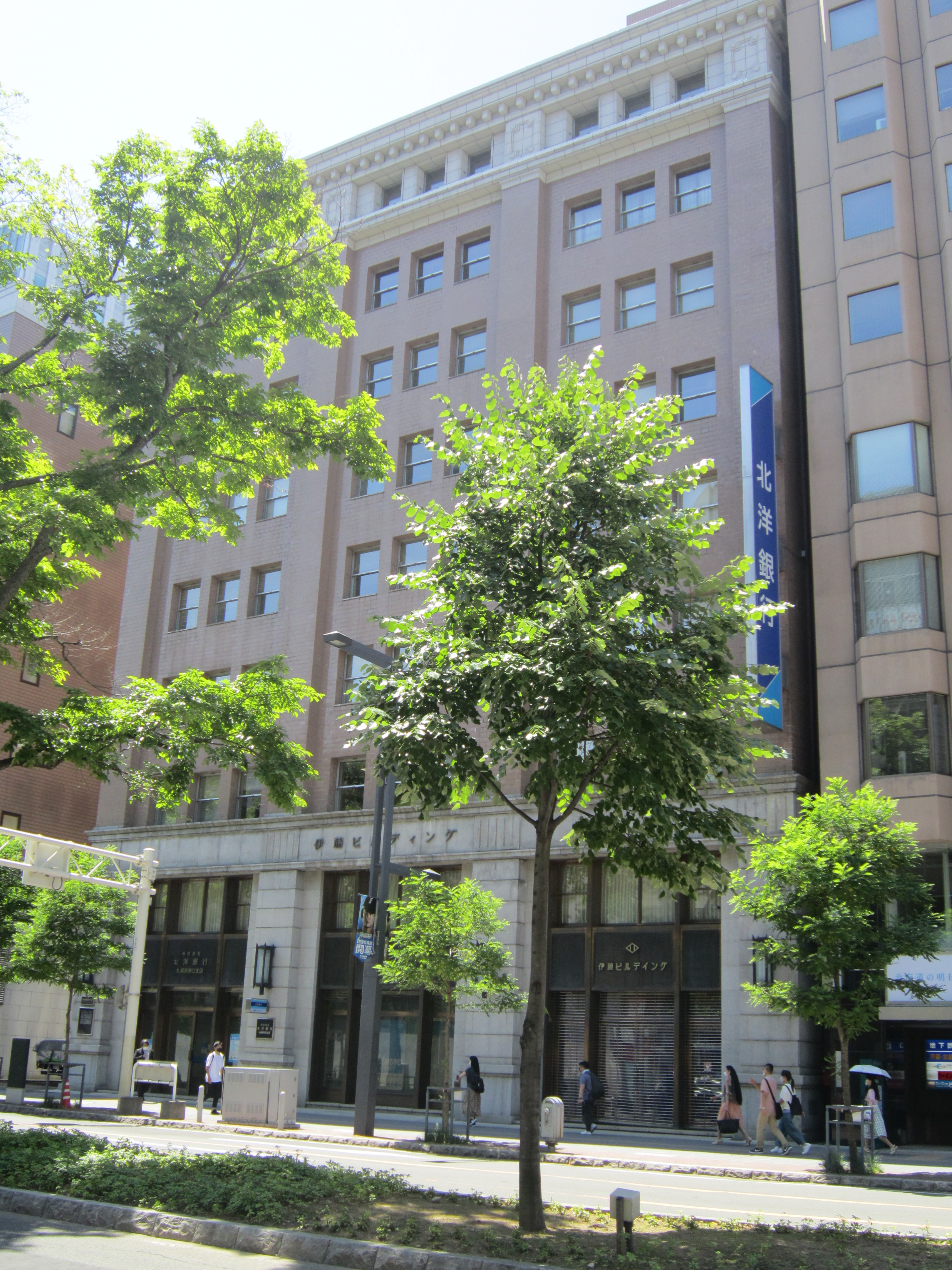 伊藤ビルディング。札幌駅前